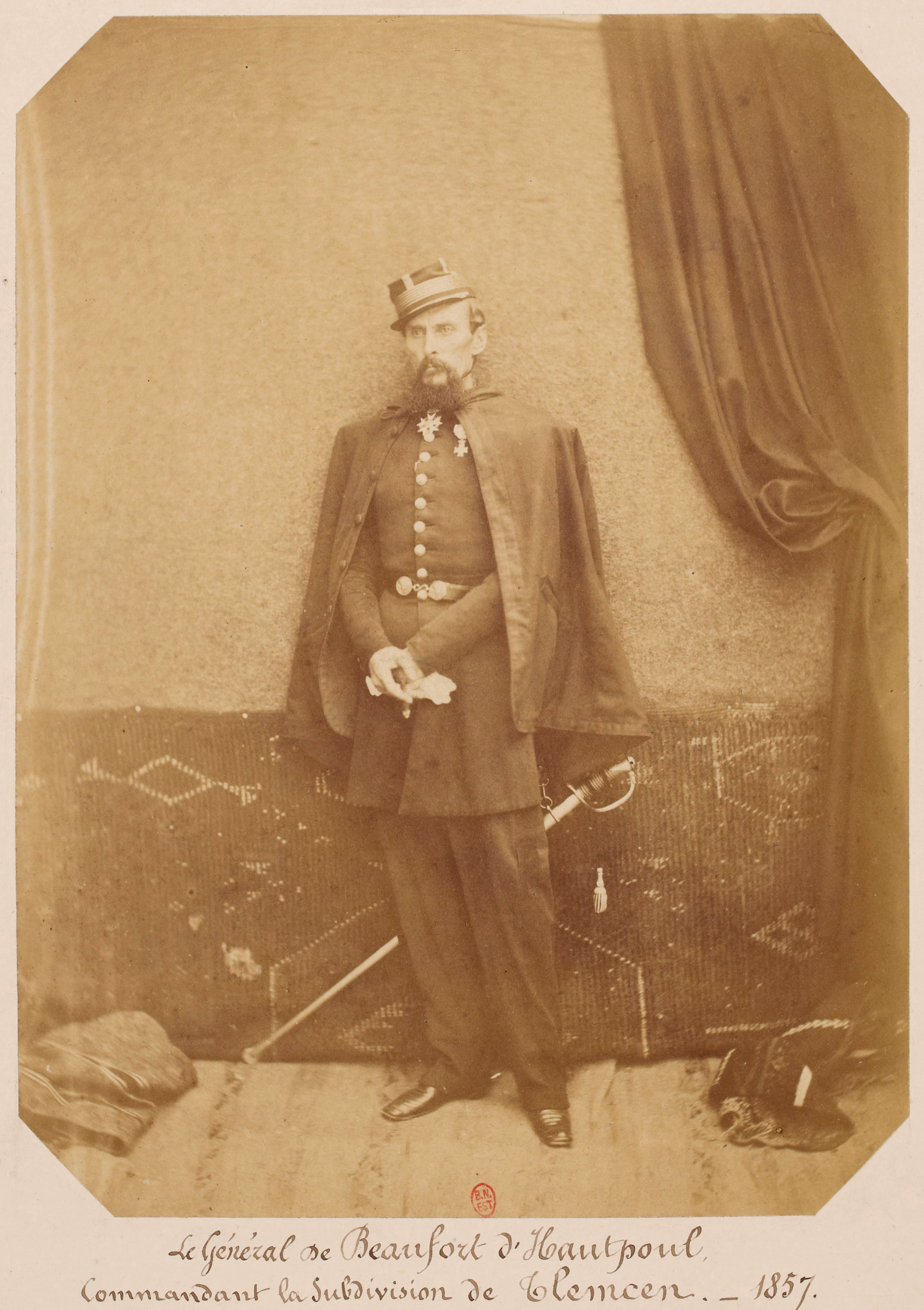 Charles Marie Napoléon de Beaufort d'Hautpoul. Photographie incluse dans le recueil Colonisation française de l'Algérie et voyage de Napoléon III en 1865.